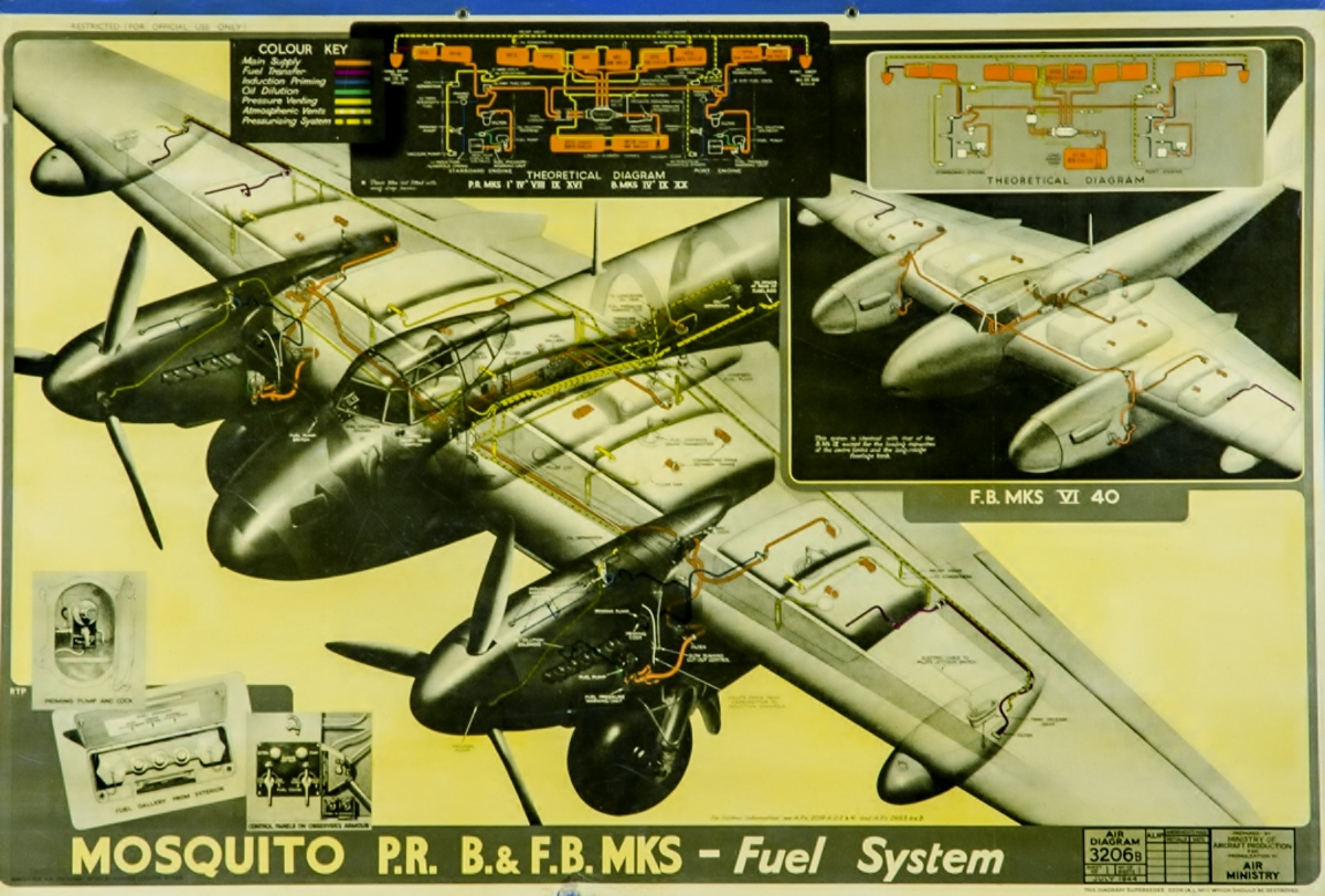 Plansch Mosquito PR B & FB MKS Fuel system